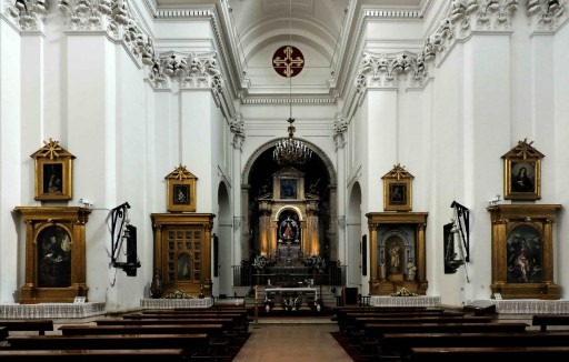 És remarcable l sensillesa dels relaules laterals, comparada amb la complexitat del retaule central.